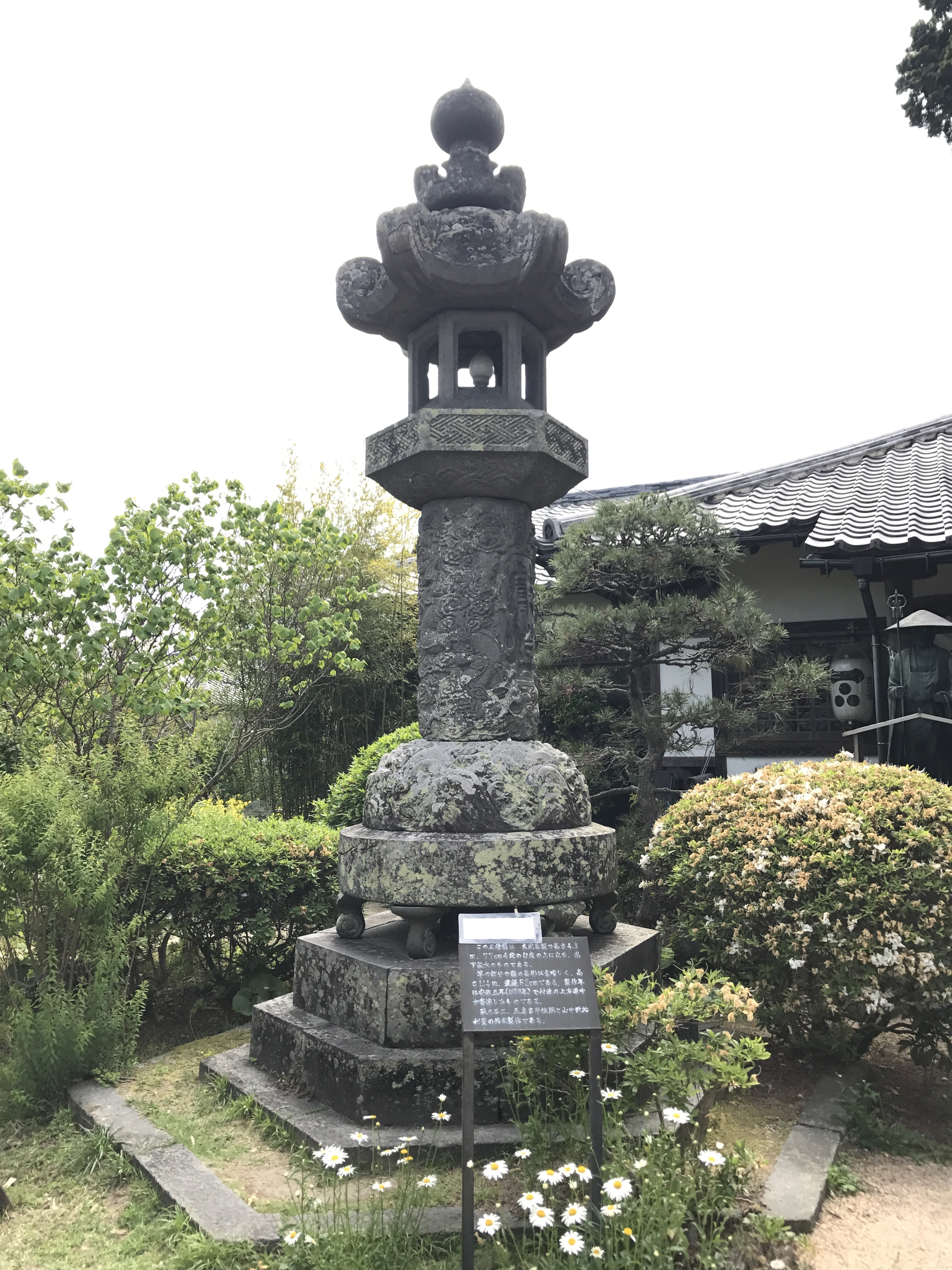 円政寺の「日本一の石灯籠」